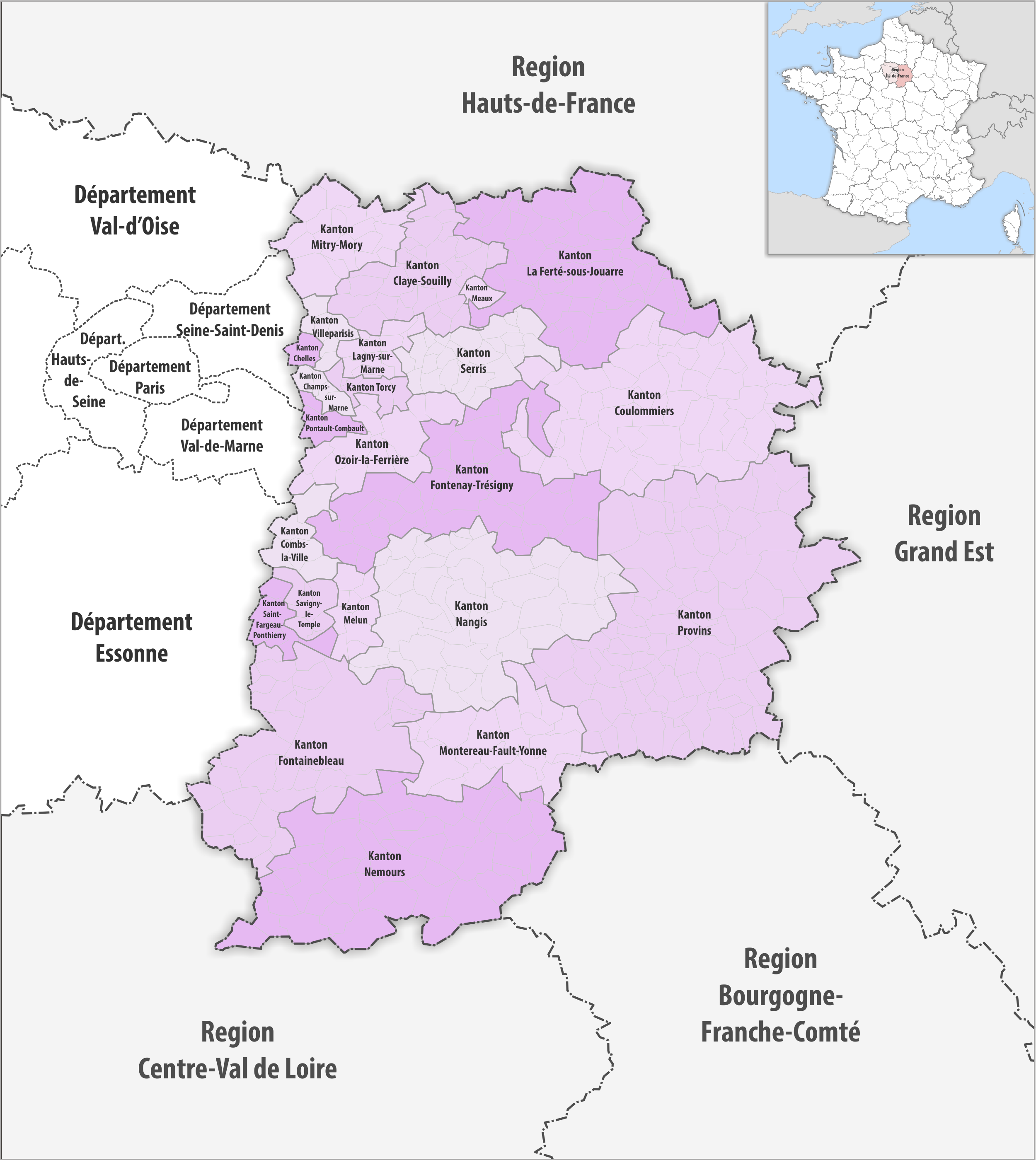 Gemeinden und Kantone im Departement Seine-et-Marne